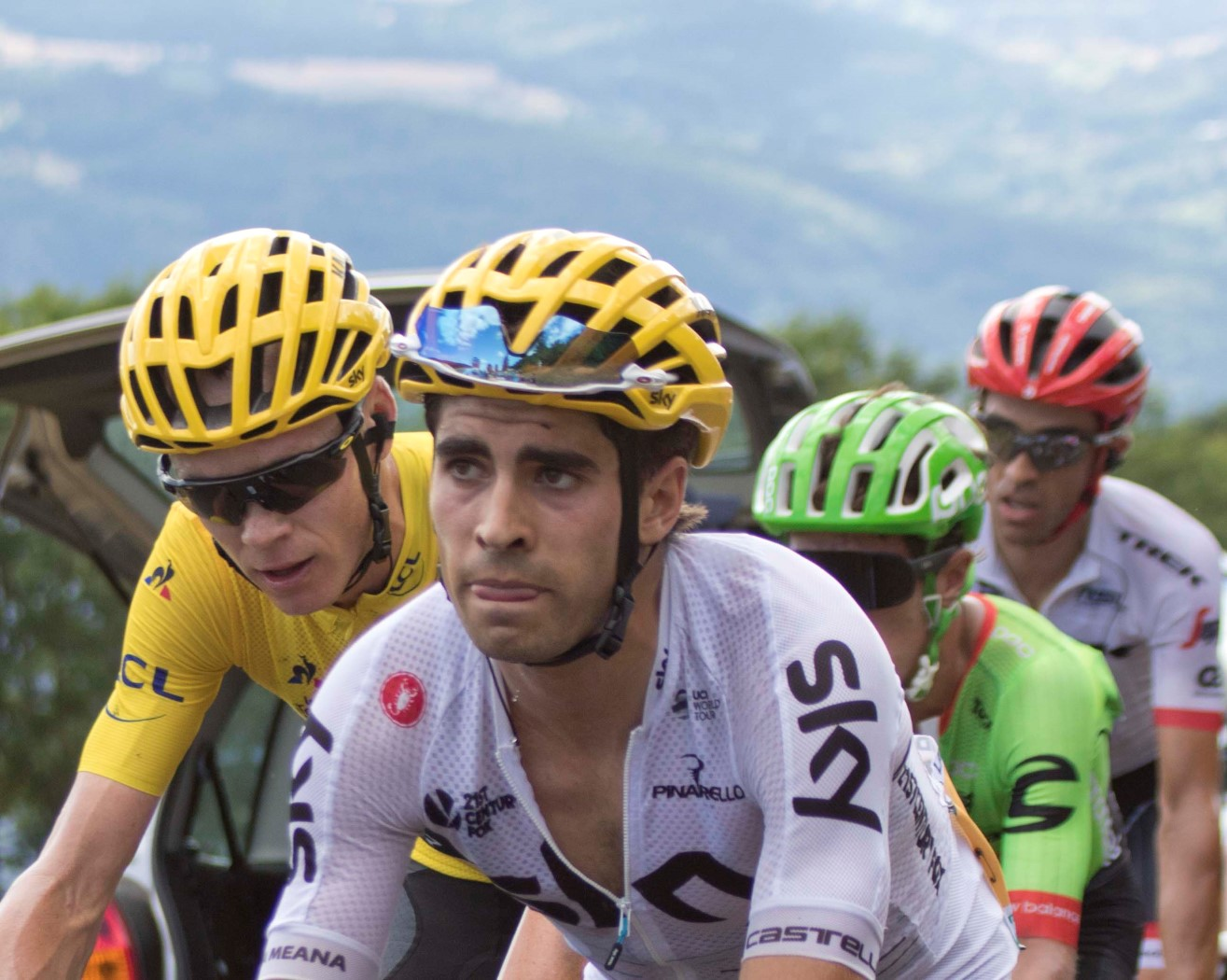 16-7_5 groep gele trui